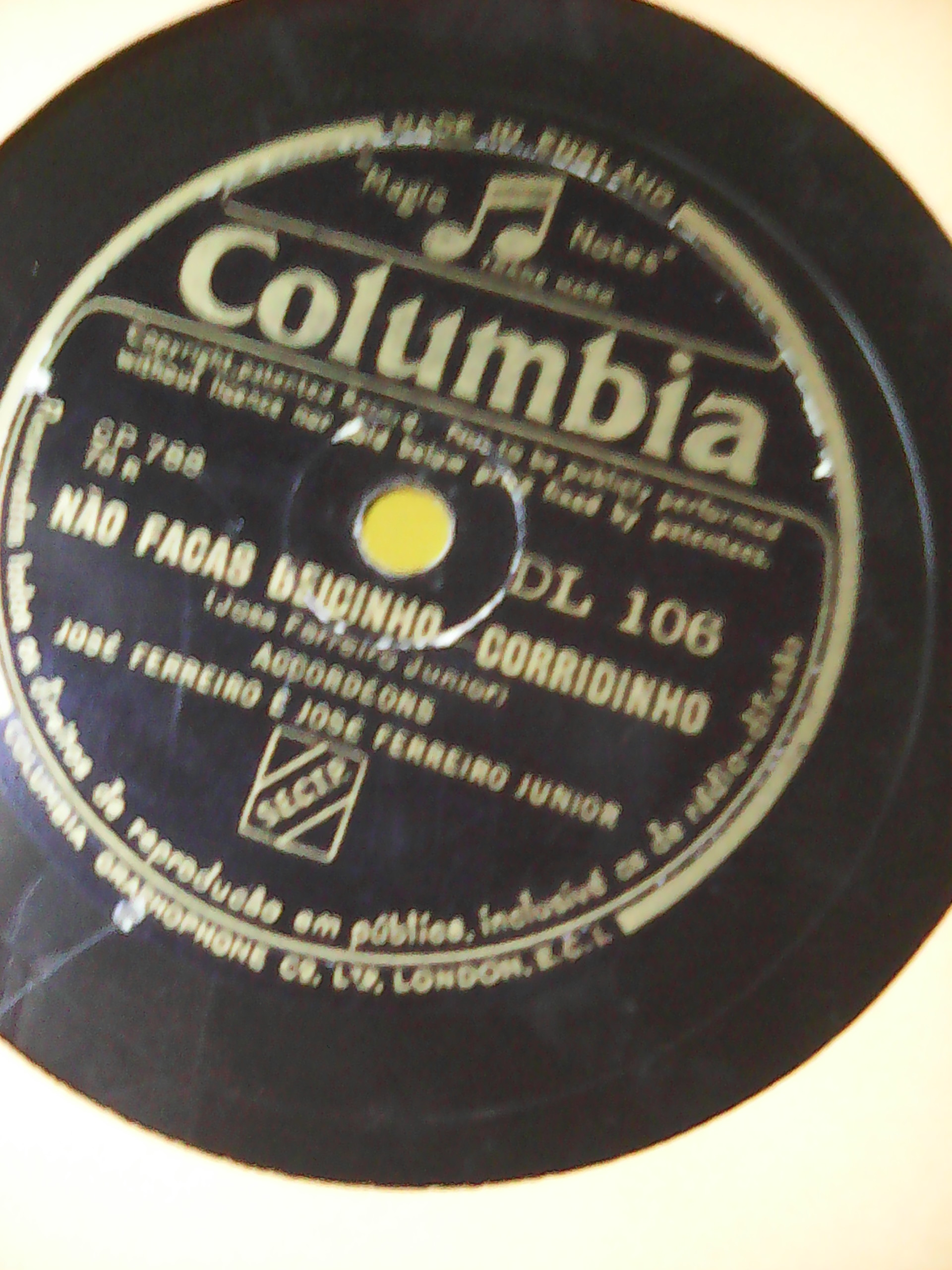 Disco de 78 rotações, Não Faças Beicinho, da autoria de José Ferreiro Júnior,por José Ferreiro e José Ferreiro Júnior